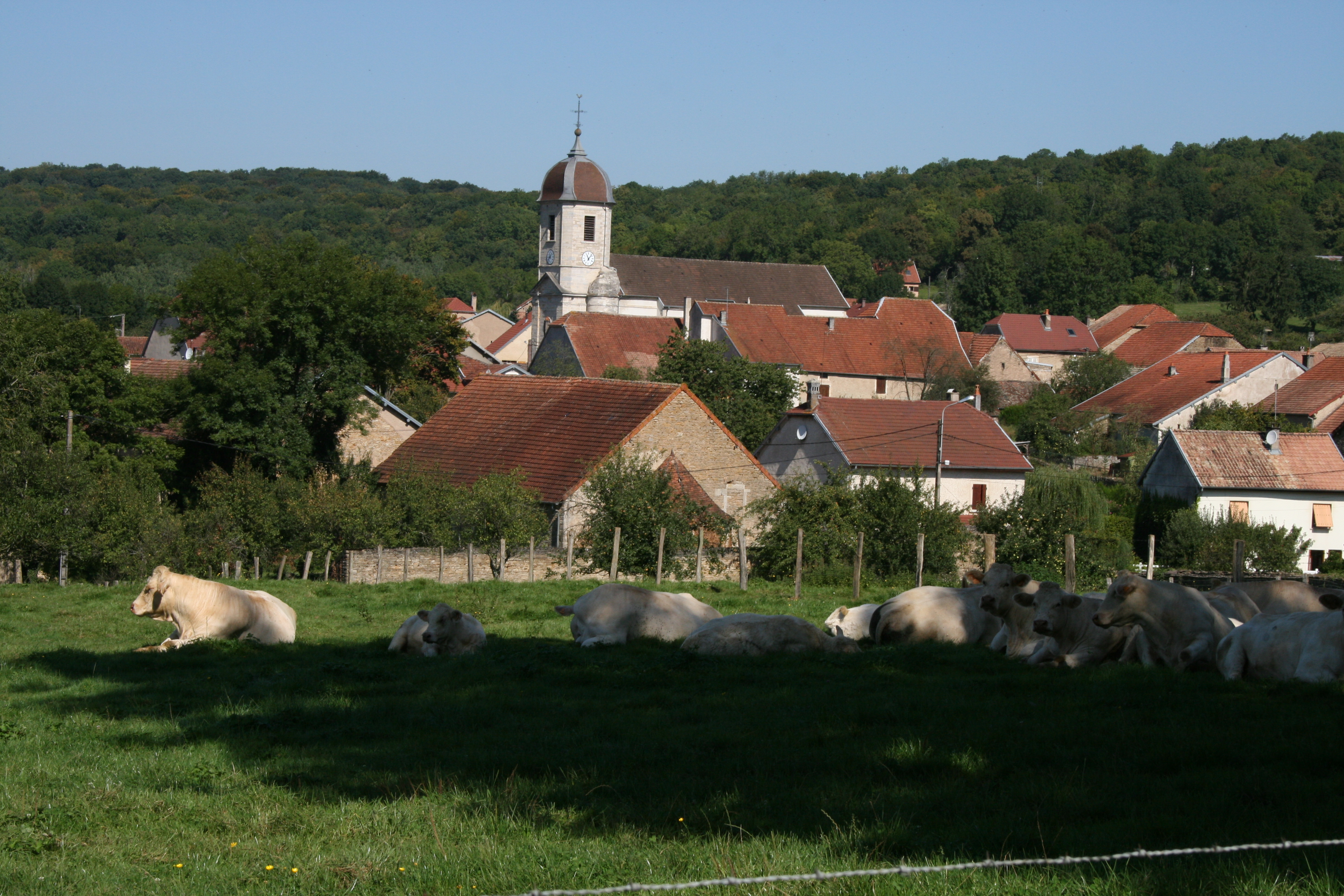 Borey vue du village